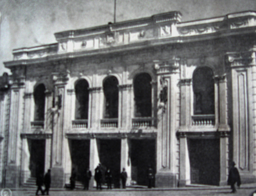 Teatro Municipal de la Paz "Alberto Saavedra Perez" en la década de 1920